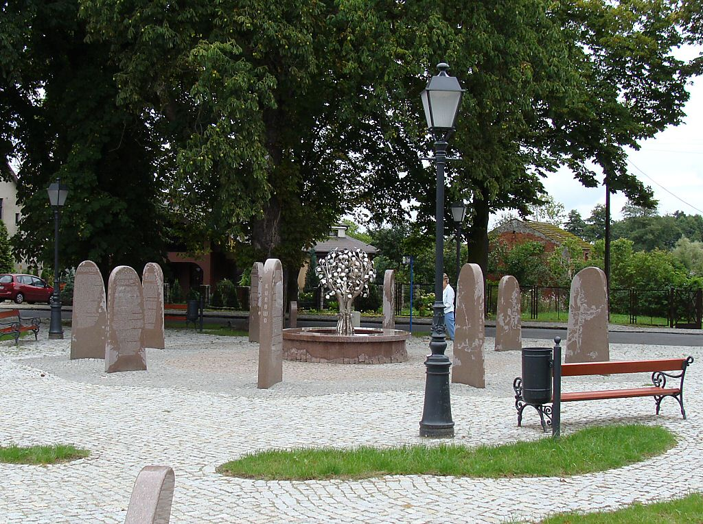 Kobylanka (woj. zachodniopomorskie) plac przy lipie "Wieniec Zgody"